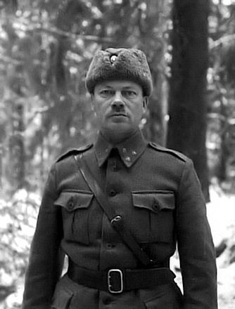 Talvisodan Jalkaväkirykmentti 39:n komentaja eversti Pietari Autti.